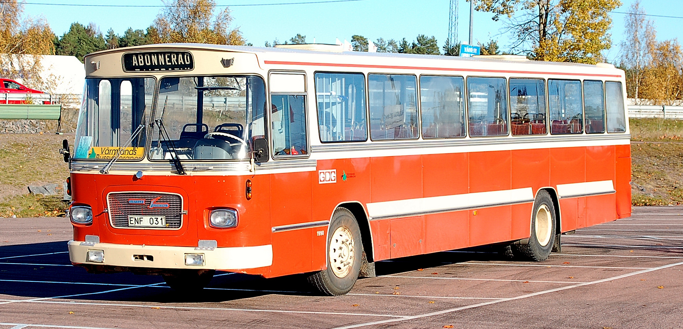 Registreringsnummer: ENF031 Fabrikat: VOLVO B 58-60T Färg: Flerfärgad Fordonsslag: BUSS Fordonsår: 1969 Fordonsslagsklass: Identifieringsnummer: 1452 I trafik första gången i Sverige: 1969-05-02 Växellåda: MANUELL Antal passagerare, max: 73 Antal sittande passagerare, max: 47 Tjänstevikt (faktisk vikt), kg: 9300 Totalvikt, kg: 14810 Ursprunglig totalvikt, kg: 14810 Max lastvikt, kg: 5510 Antal axlar: 2 Längd, mm: 12350 Bredd, mm: 2500 Drivmedel 1: DIESEL Tankvolym, liter: 180 Motoreffekt, kW: 154,0 Effektnorm: SMMT.